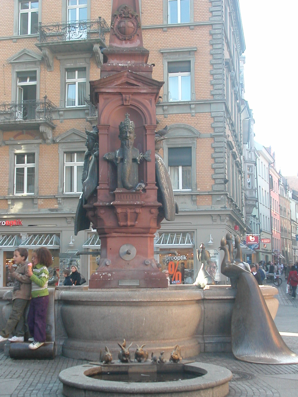 Kaiserbrunnen in Konstanz